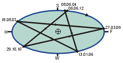 Position der Venus bei der unteren Konjunktion in den Jahren 2004-2012 Die Grafik zeigt das so genannte Venus-Pentagramm. Innerhalb von acht Jahren bilden die Positionen der Venus bei unterer Konjunktion am Himmel ein Pentagramm, das sich fast schließt. Neben dem mythologischen Hintergrund ist vor allem die Verbindung des Diagramms zum Rhythmus der Venus-Durchgänge (z.B. bier eingezeichnet 2004 und 2012) interessant. Eingezeichet sind neben den Positionen der Venus die Lage der Solstizien (W für Winter, S für Sommer) und Äquinoktien (F für Frühling und H für Herbst) auf der Ekliptik.